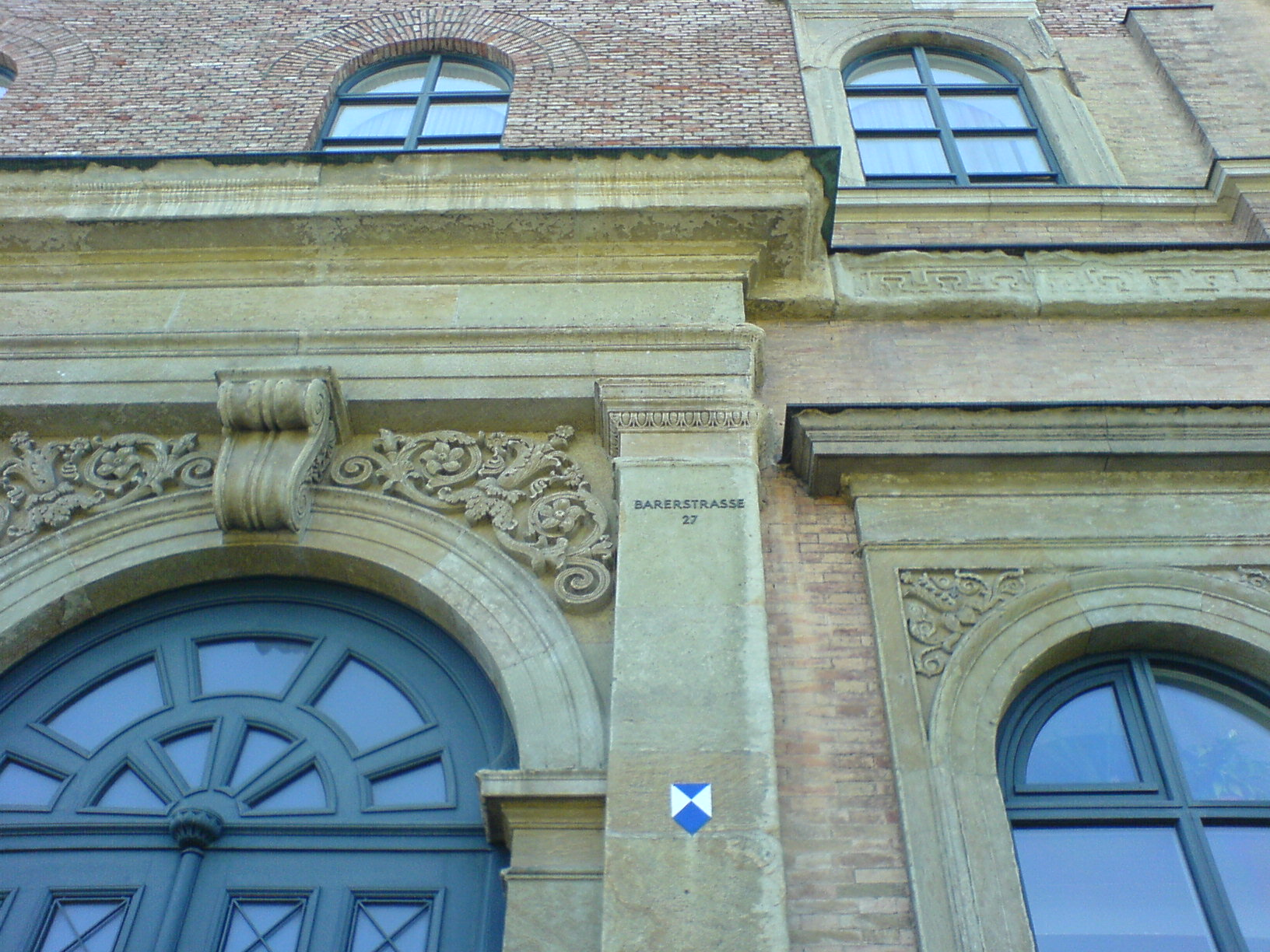 Alte Pinakothek, außen: Klenze-Portal rechts - mit (einfachem) Emblem der Haager Konvention von 1954 zur Kennzeichnung von geschütztem Kulturgut